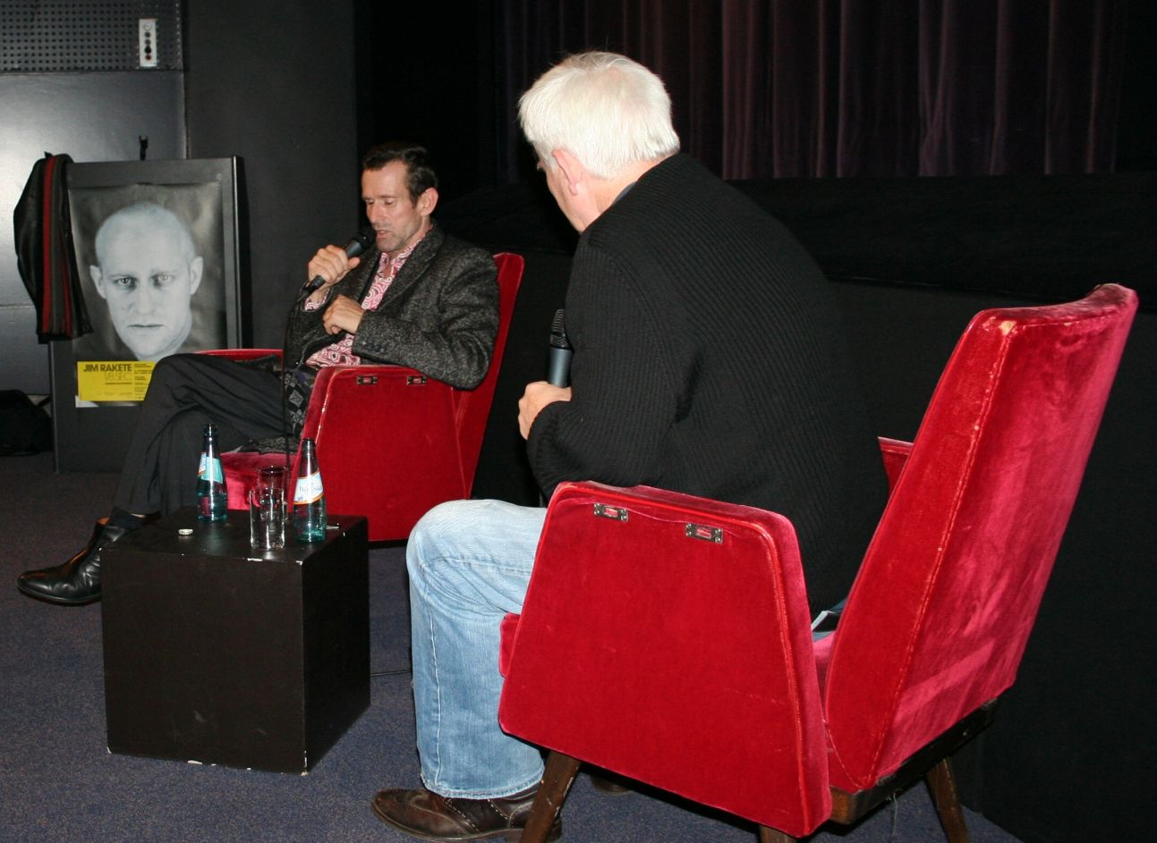 Schauspieler Ulrich Matthes (li.) im Gespräch mit Starfotograf Jim Rakete nach einer Vorführung seines Spielfilms "Novemberkind" im Deutschen Filmmuseum in Frankfurt/Main